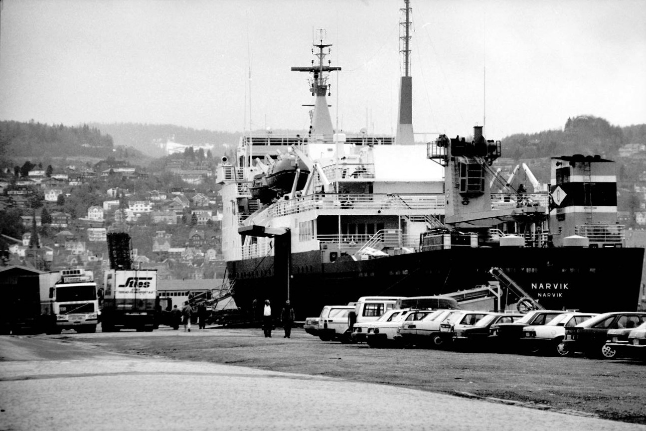 M/S Narvik ved Brattørkaia før ombygging.